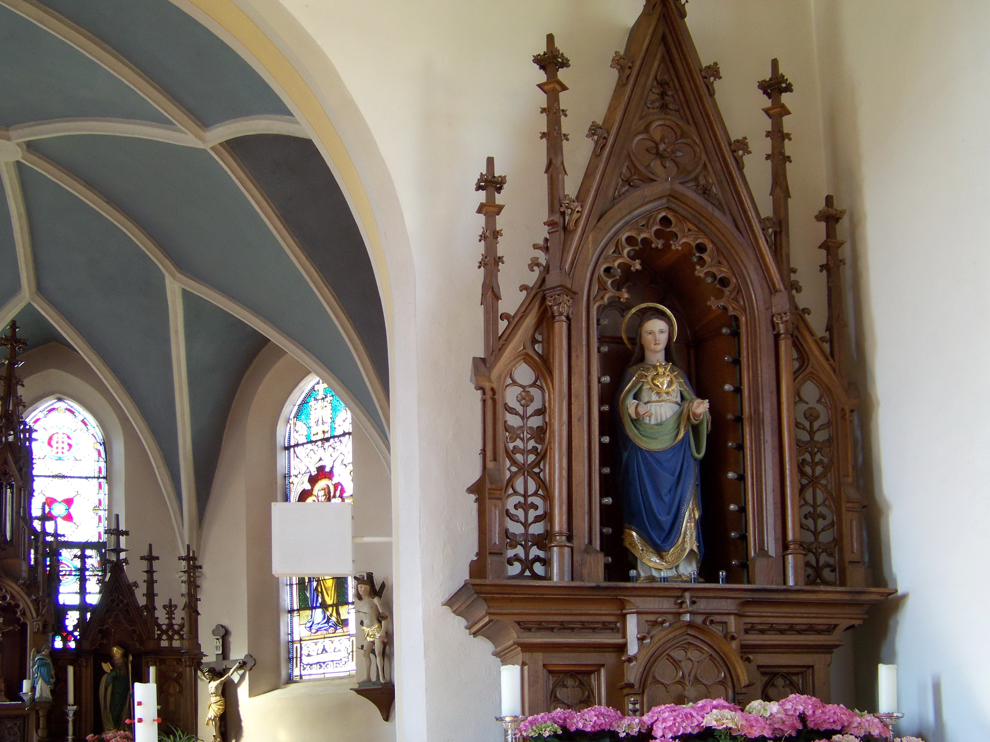 Laberweinting, Franken 13, katholische Expositurkirche St. Nikolaus. Rechter Seitenaltar mit der Figur 'Herz-Maria'